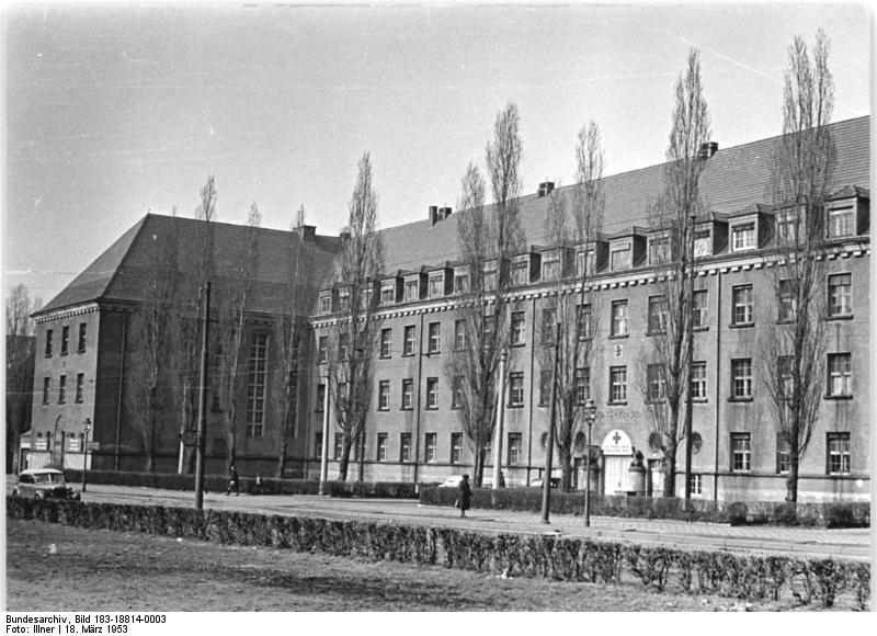 Leipzig, Universität, Frauenklinik Zentralbild Illner 18.3.1953. Die Universität Leipzig im Karl-Marx-Jahr 1953. Die Universität Leipzig hat im Karl-Marx-Jahr am 5. Mai zu Ehren des größten Sohnes der Deutschen Nation den Namen "Karl-Marx-Universität" erhalten - Gebäude der Universität. UBz: Die Universität-Frauenklinik. Der Leiter dieser Klinik ist der Nationalpreisträger Prof. Schröter.